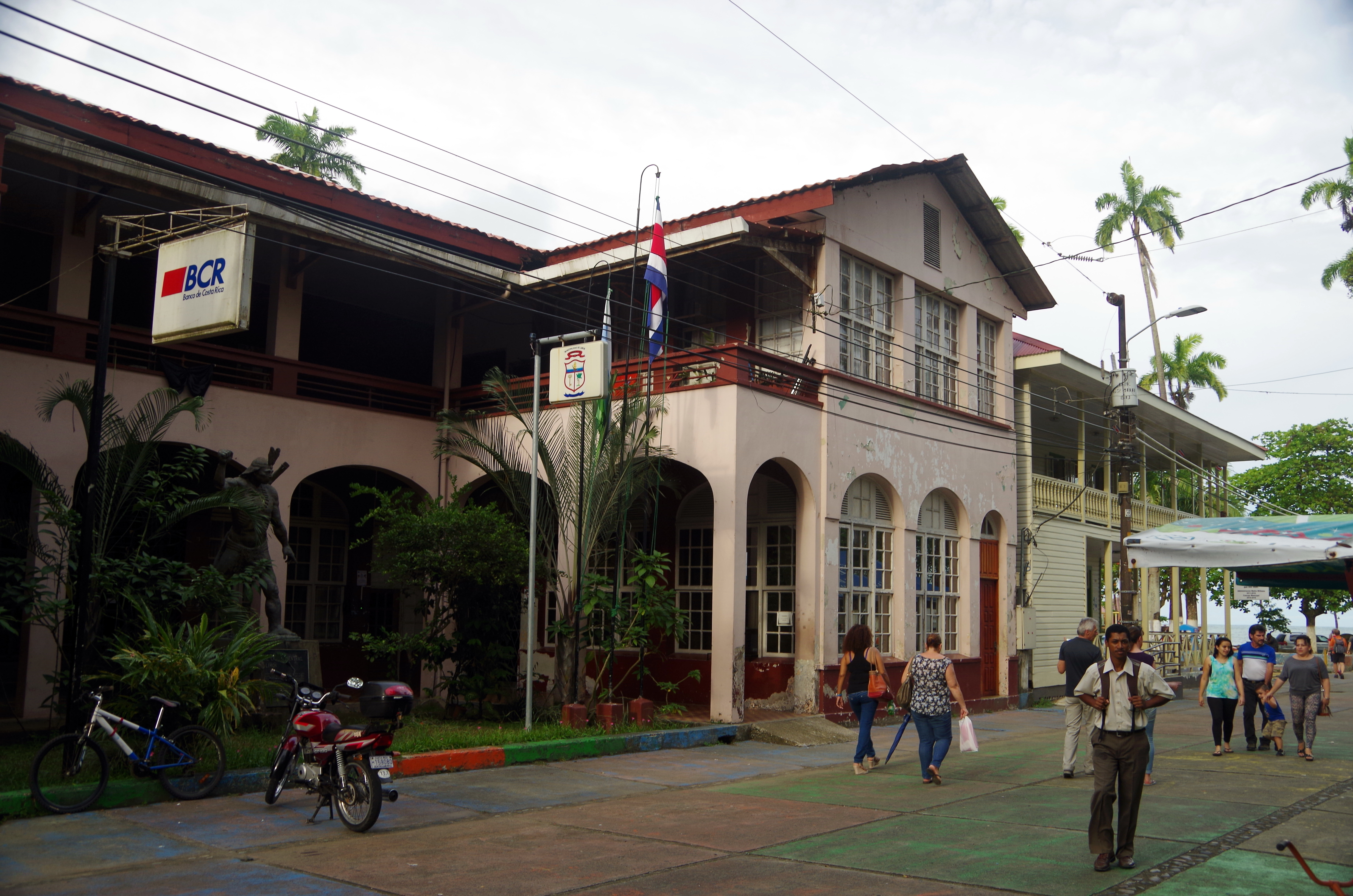 Verwaltungsgebäude, Limón, Costa Rica